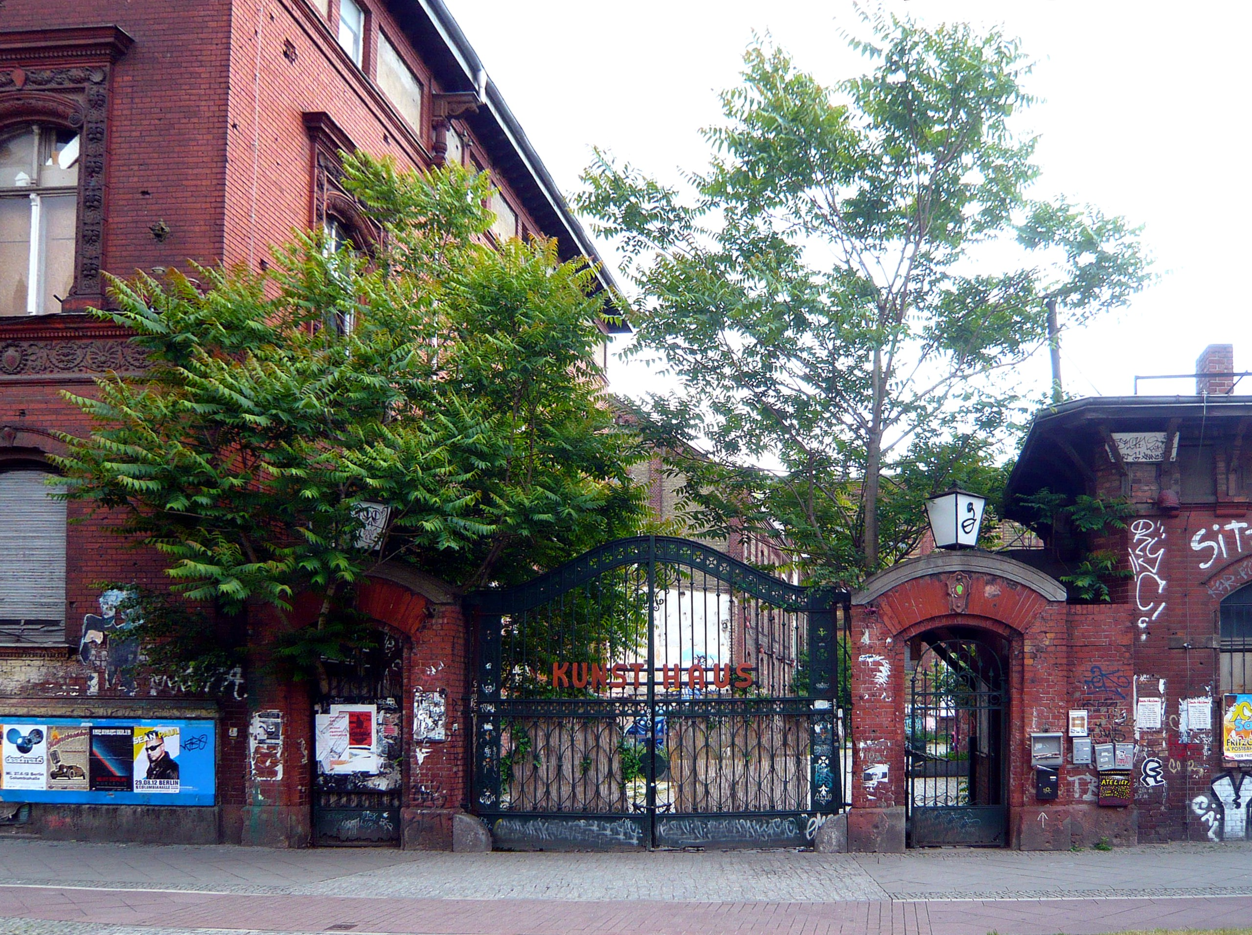 Berlin-Friedrichshain, ehemalige Brauerei Patzenhofer-Schultheiß